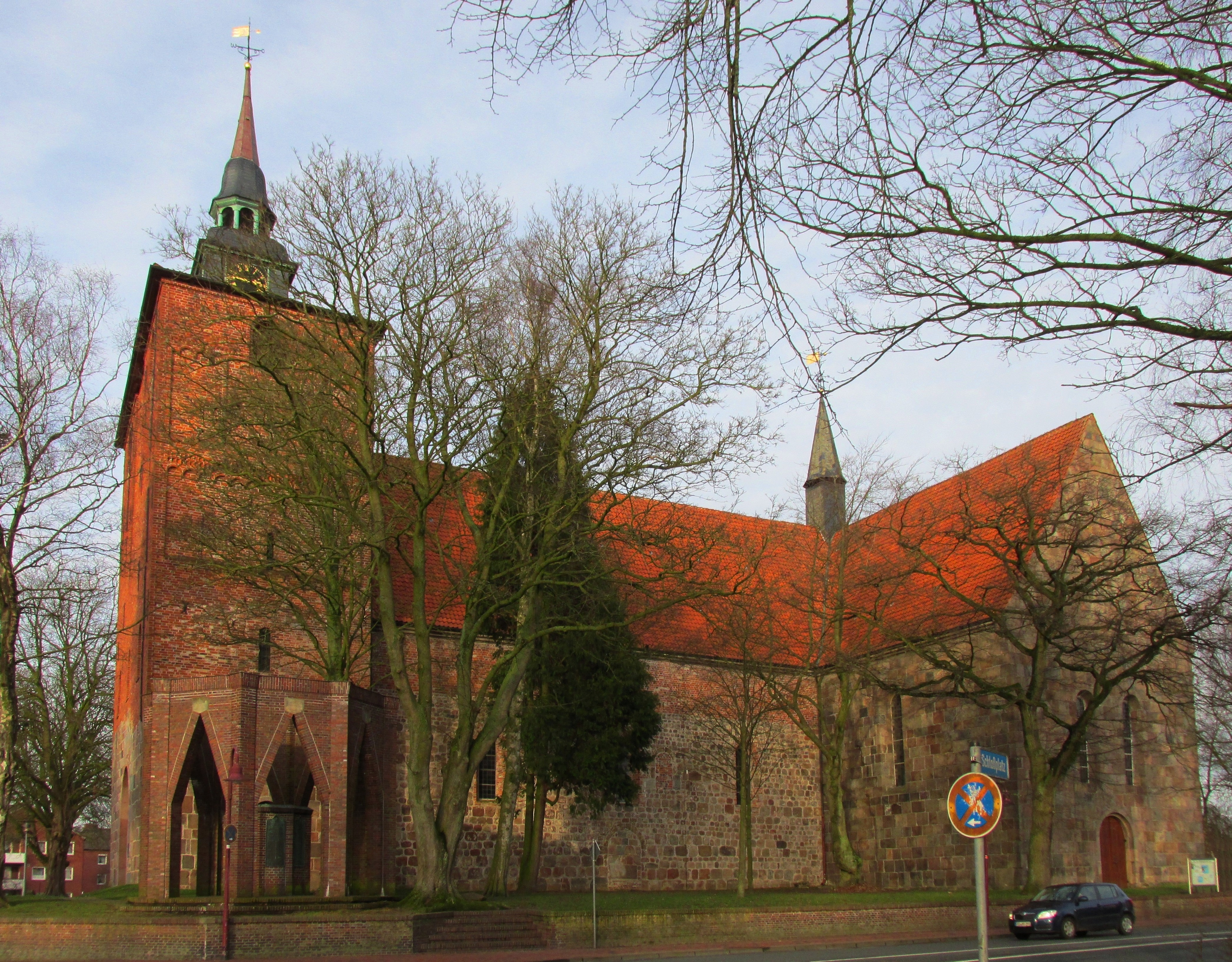 Varel, ev.-luth. Schlosskirche St. Peter